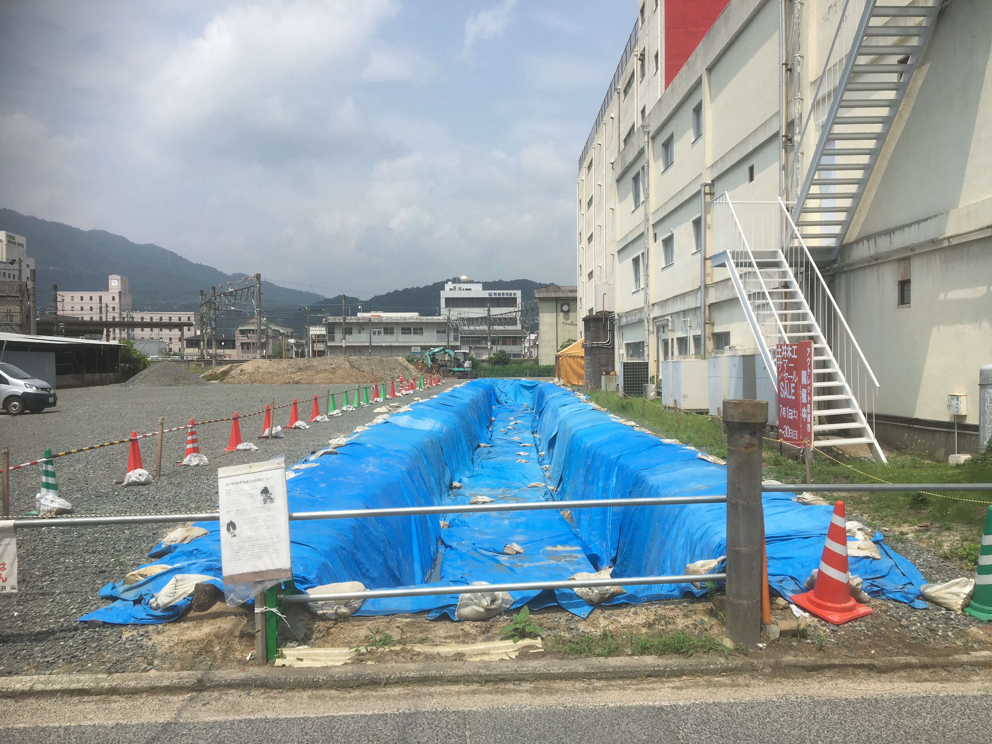 広島県府中市、古代山陽道の発掘調査 2017年8月 道の駅の臨時駐車場